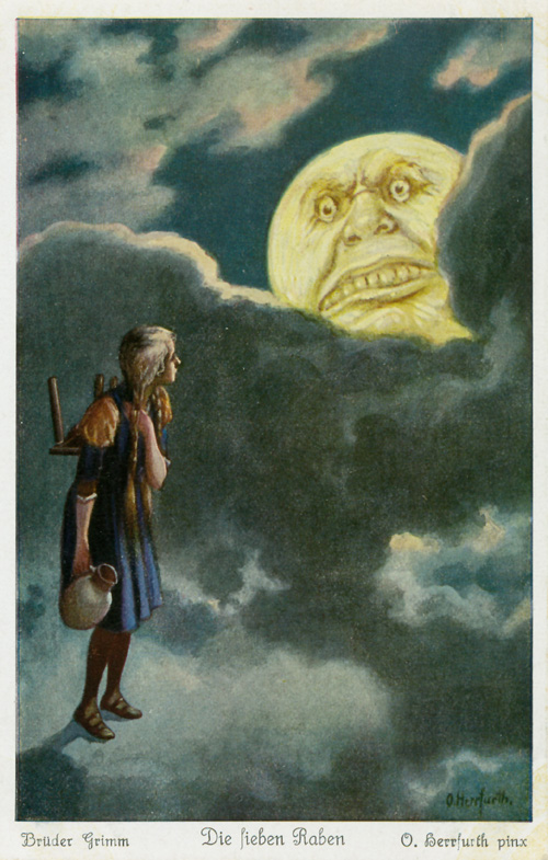 Die sieben Raben. Postkartenserie nach dem Märchen. Serie von sechs Postkarten der Firma Uvachrom. Serie 320, Nr. 4890. Text der Rückseite: Schwesterchen suchte die zu Raben verzauberten sieben Brüder auf dem Mond. Der schaute hinter Wolken hervor. Kalt und eisig wehte die Luft. Der Mond grinste und sprach: "Ich rieche Menschenfleisch." Da lief Schwesterchen wieder davon.